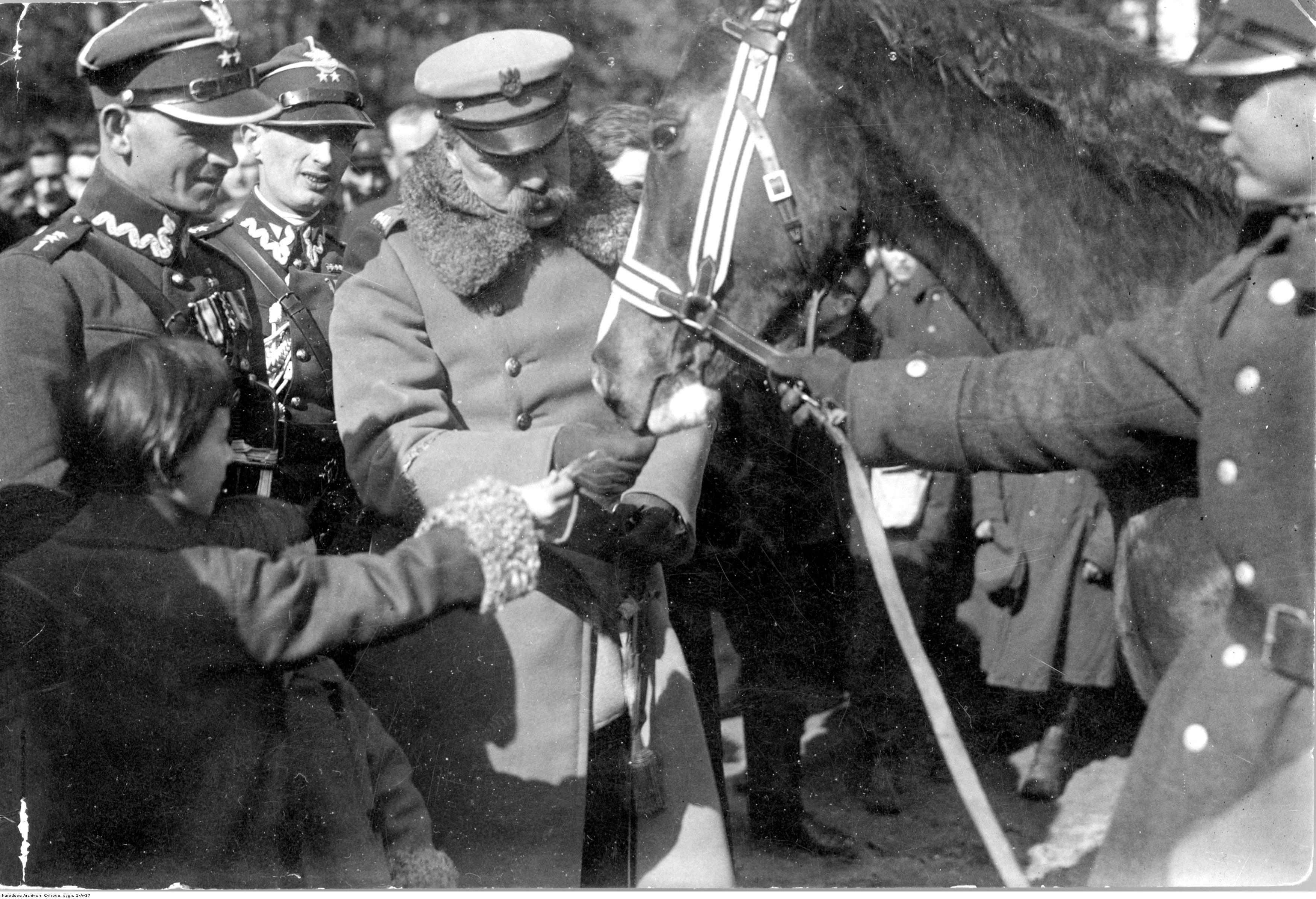 Józef Piłsudski (karmi Kasztankę) w towarzystwie córek Wandy i Jadwigi oraz adiutantów por. Michała Galińskiego (1. z lewej) i por. Jerzego Jabłonowskiego (2. z lewej).